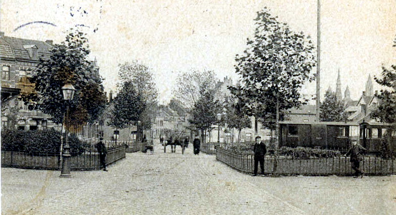 Stoomtram naar Glons op het Koningin Emmaplein in Maastricht, 1910. Fotocollectie RHCL Maastricht, GAM 12684.